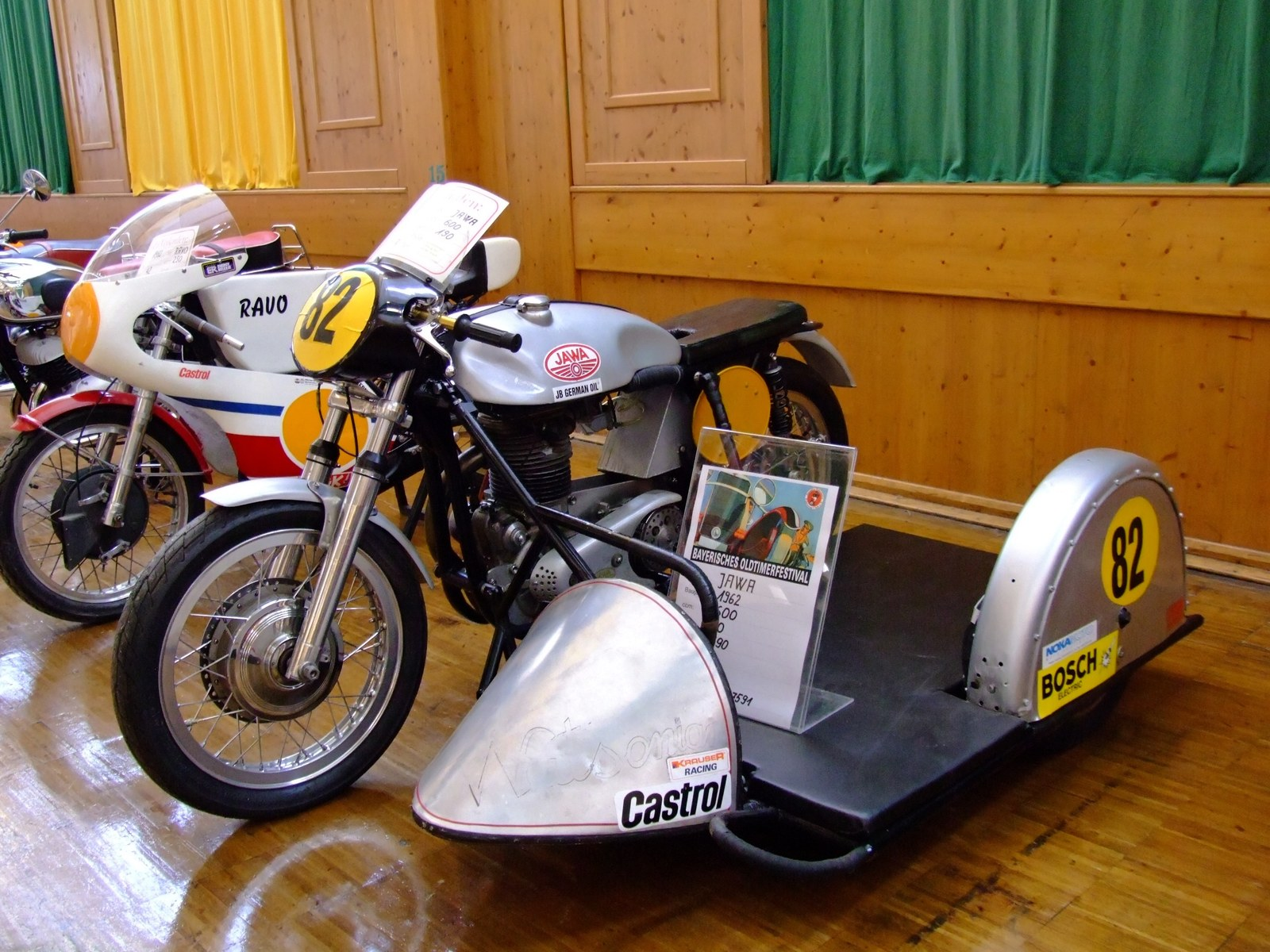 Jawa Baujahr: 1962 600 ccm 80 PS 190 km/h Quelle: selbst fotografiert, 07/2007 Fotograf: Späth Chr.